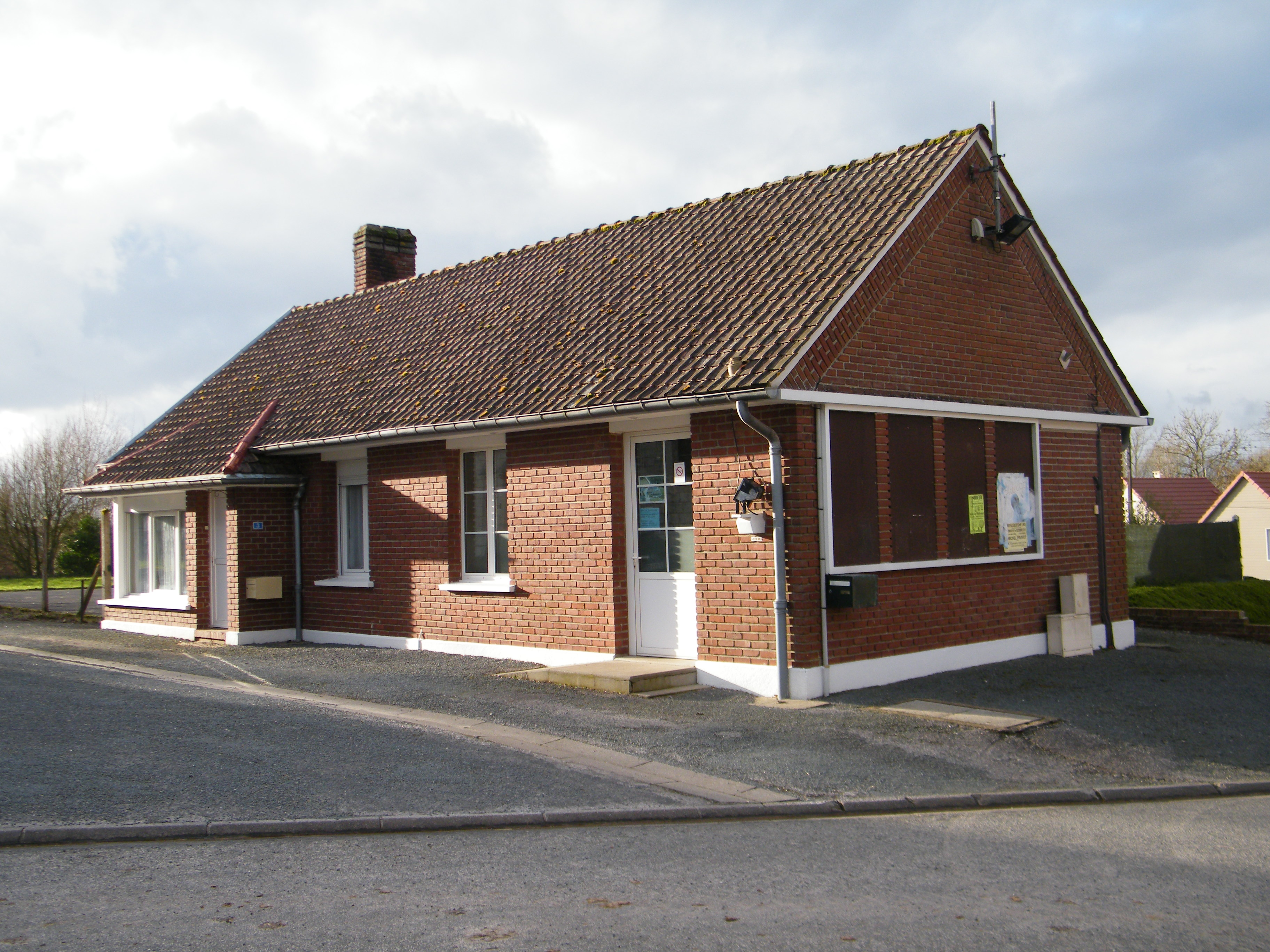 Coulonvillers-mairie.